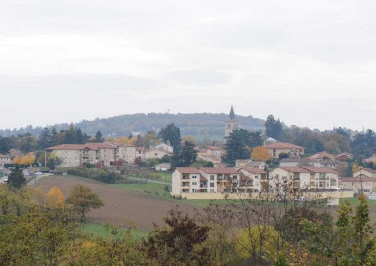 Lentilly, vue générale depuis la route Napoléon